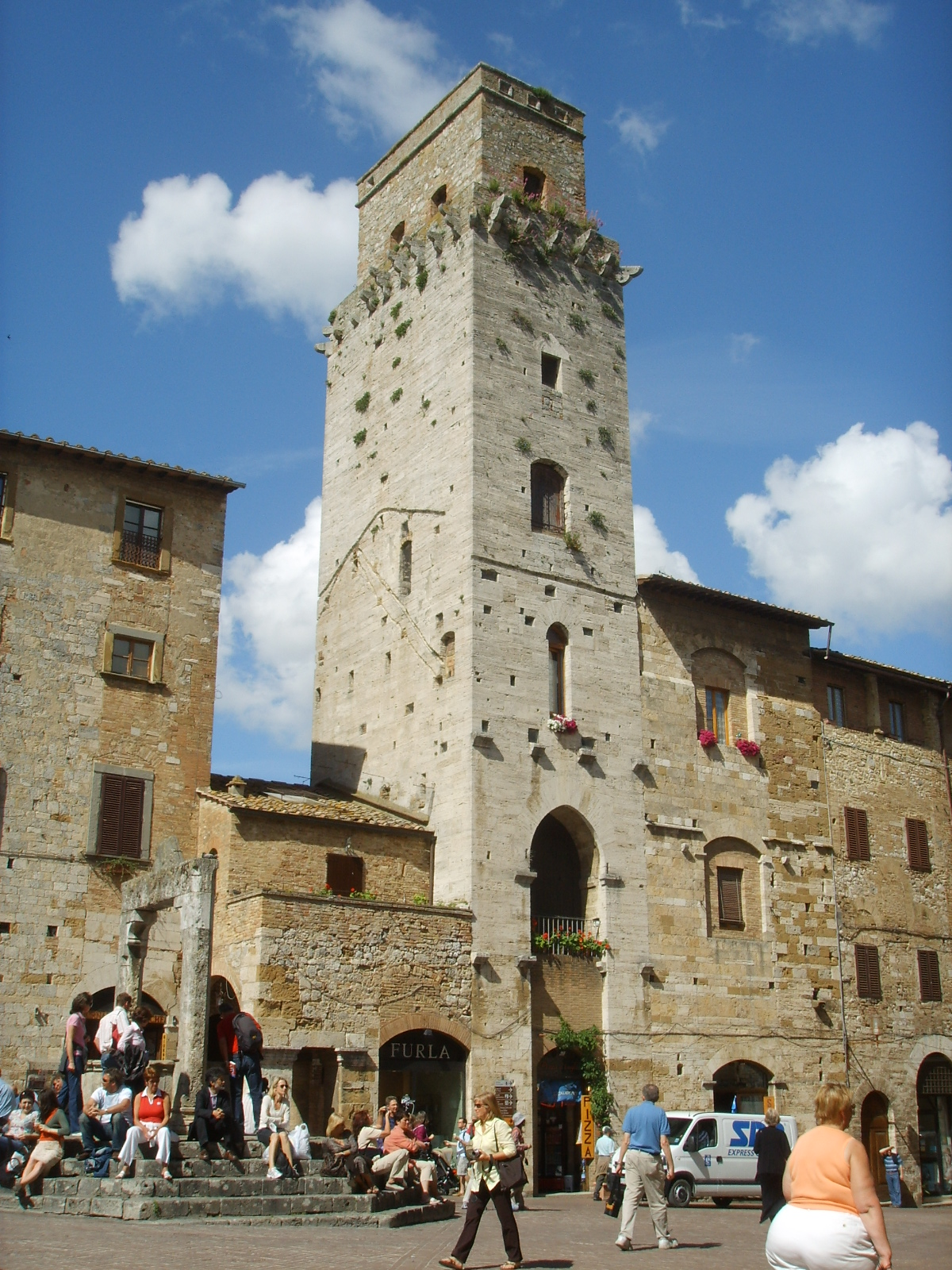 San gimignano piazza della cisterna 07 torre